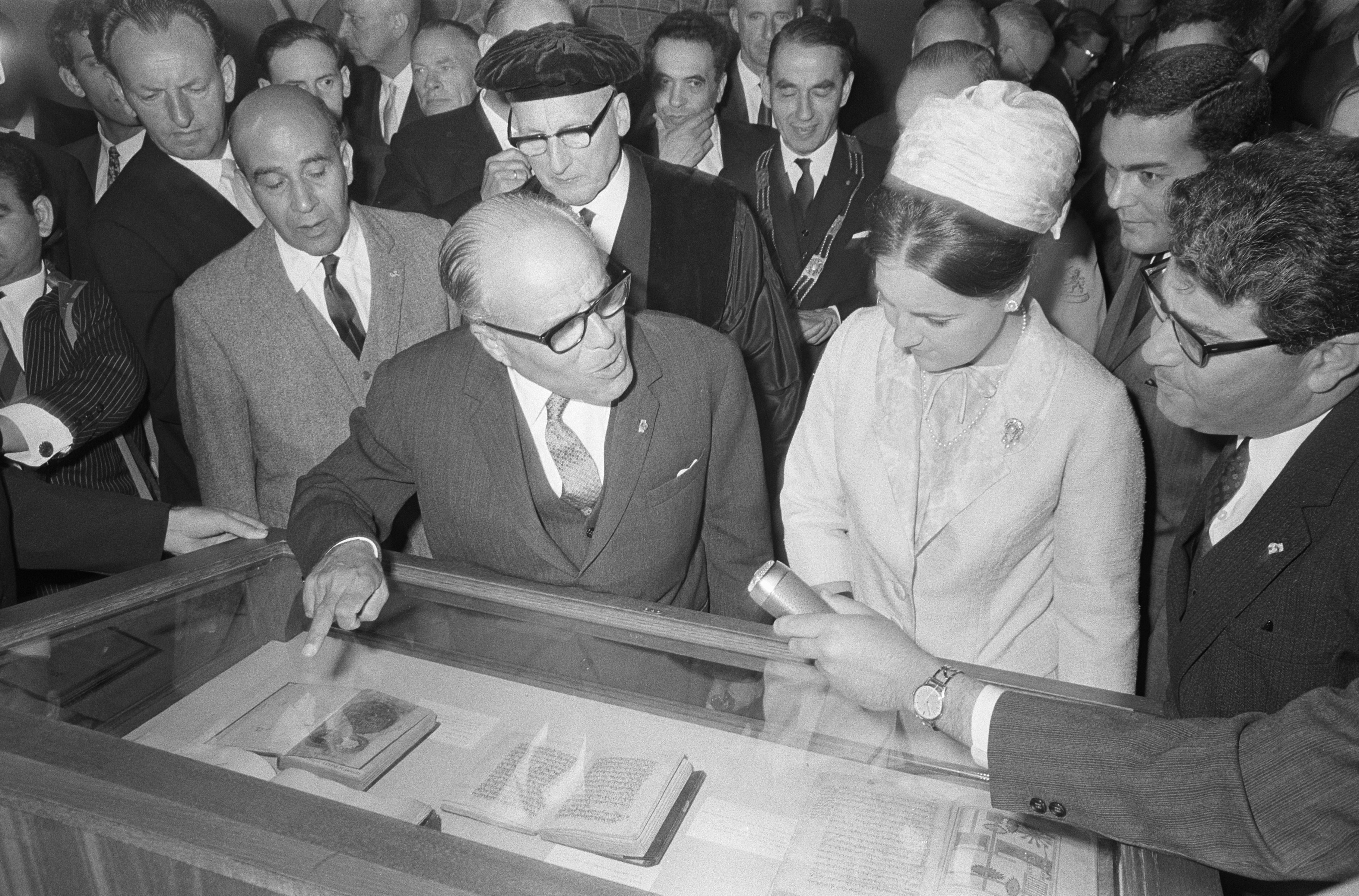 Collectie / Archief : Fotocollectie Anefo Reportage / Serie : [ onbekend ] Beschrijving : President Bourguiba en prinses Margriet brachten bezoek aan de Leidse Universiteit Datum : 8 juli 1966 Trefwoorden : bezoeken, universiteiten Persoonsnaam : Bourguiba, Habib Ben Ali, Margriet, prinses Fotograaf : Nijs, Jac. de / Anefo Auteursrechthebbende : Nationaal Archief Materiaalsoort : Negatief (zwart/wit) Nummer archiefinventaris : bekijk toegang 2.24.01.05 Bestanddeelnummer : 919-3361